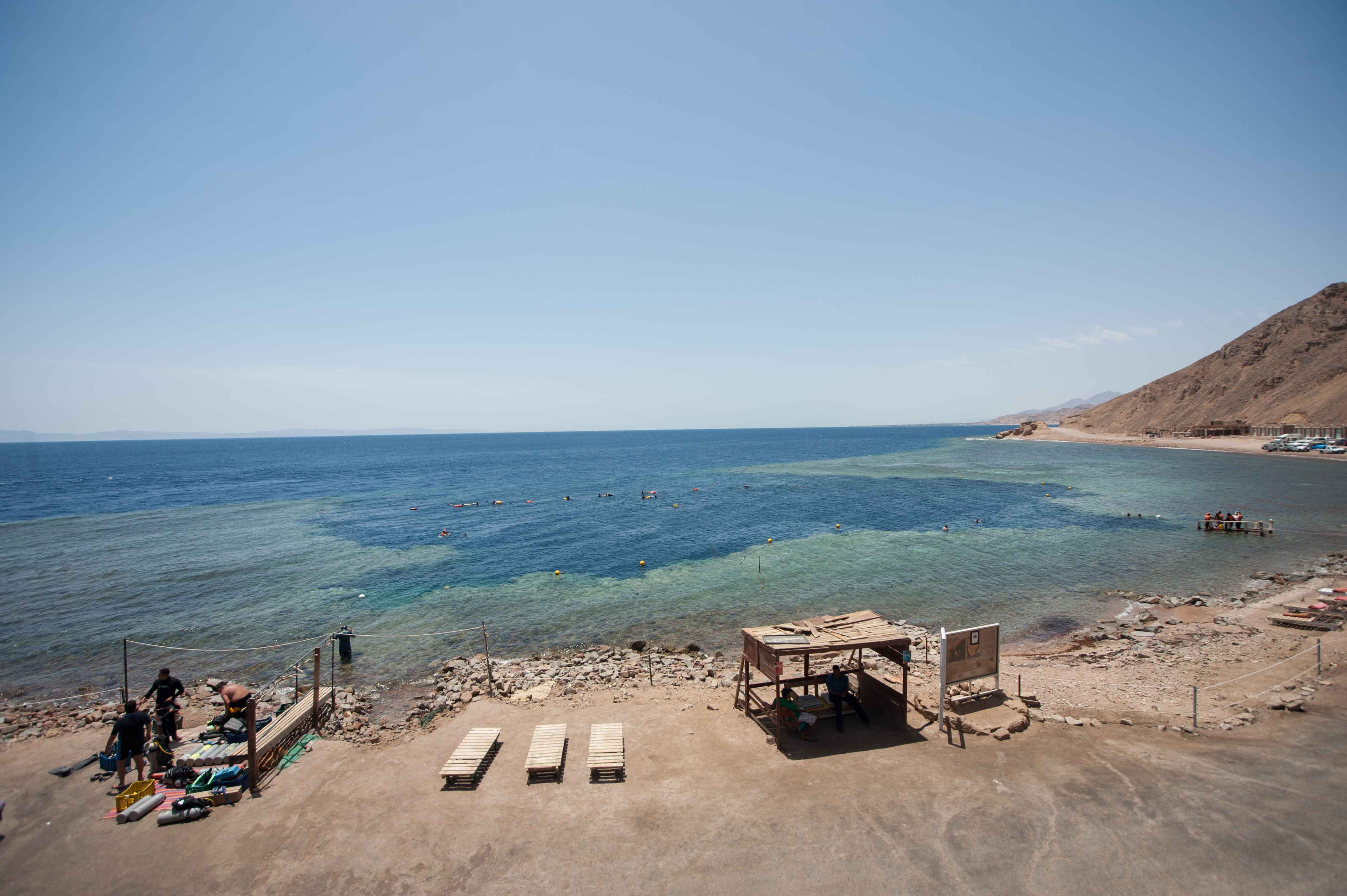 مصرى: منطقة - blue hole